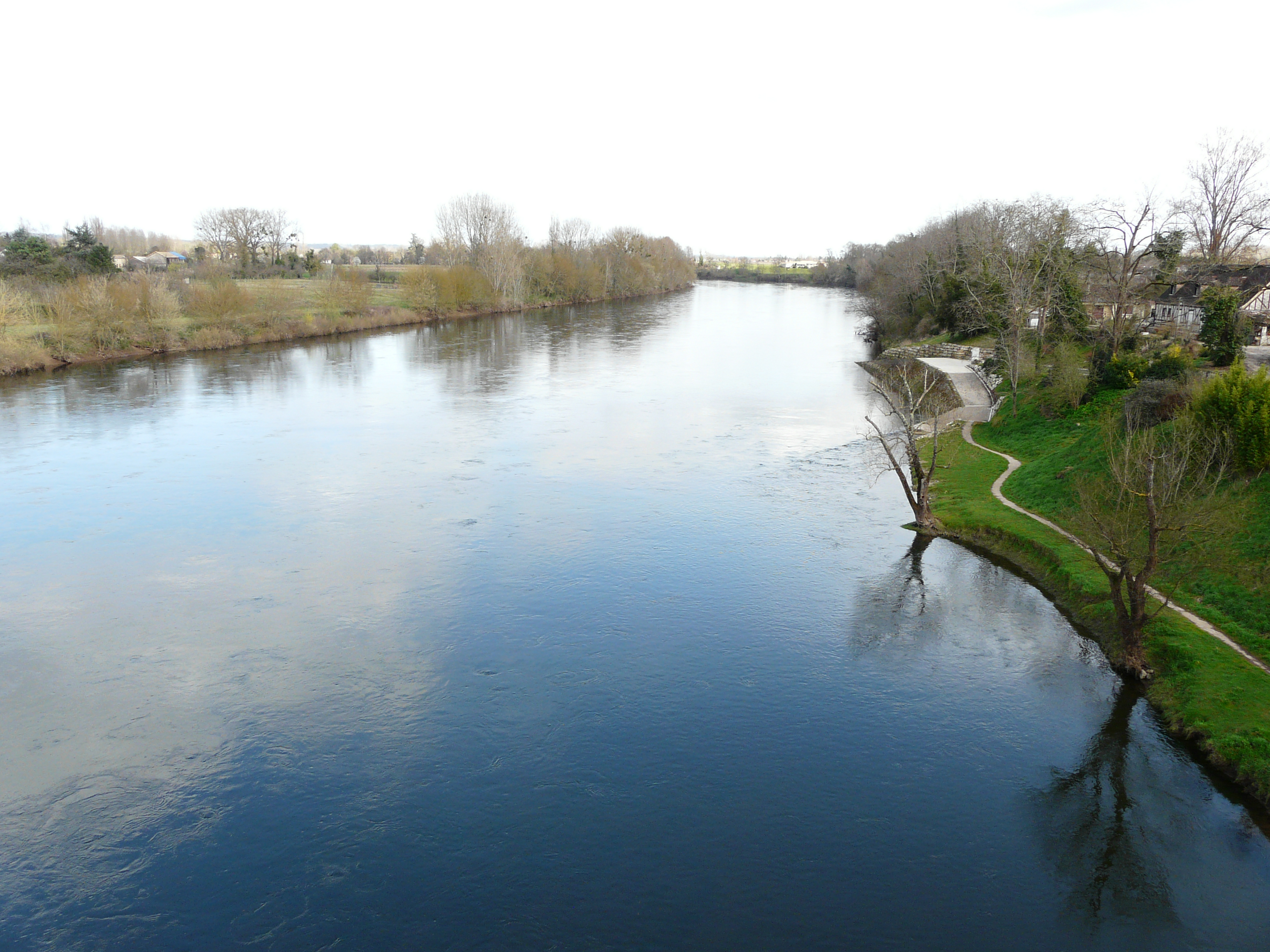 La Dordogne en amont du pont de la route départementale 15, entre Saint-Pierre-d'Eyraud (à gauche) et Gardonne (à droite).